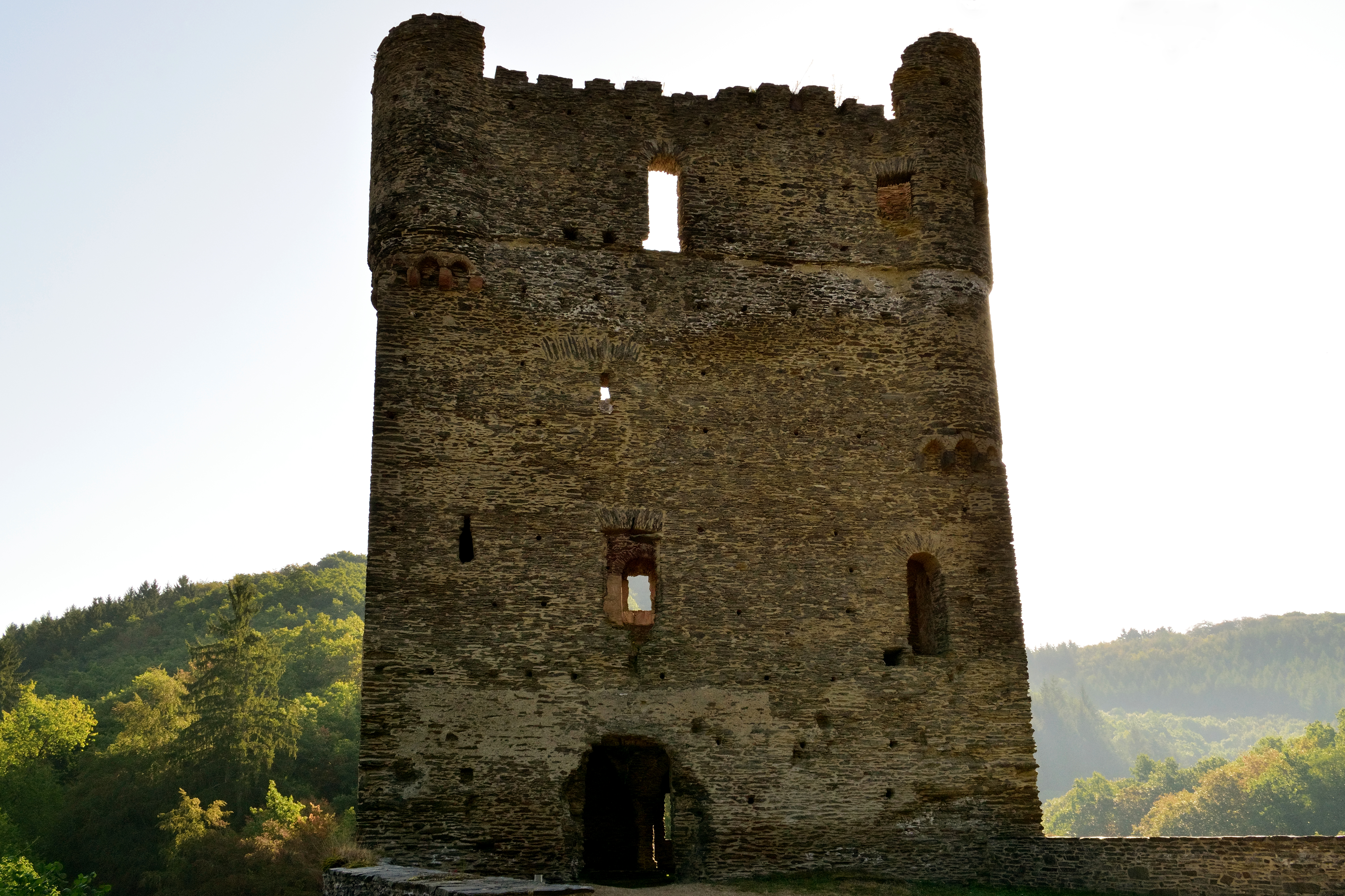 Das Turmhaus der Burgruine Balduinseck auf dem Burghof von der westlichen Zugangsseite. Das Gebäude diente als Wohn- und Wehrturm zugleich.